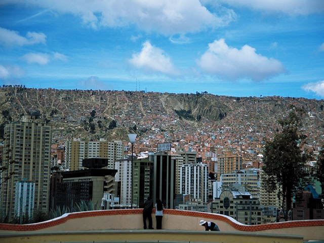 La Paz de Bolivia desde Parque Laicacota. foto por usario Inti-sol, en deciembre de 2001. ボリビア・ラパスの風景。ライカコタ公園より2001年12月、投稿者の撮影。